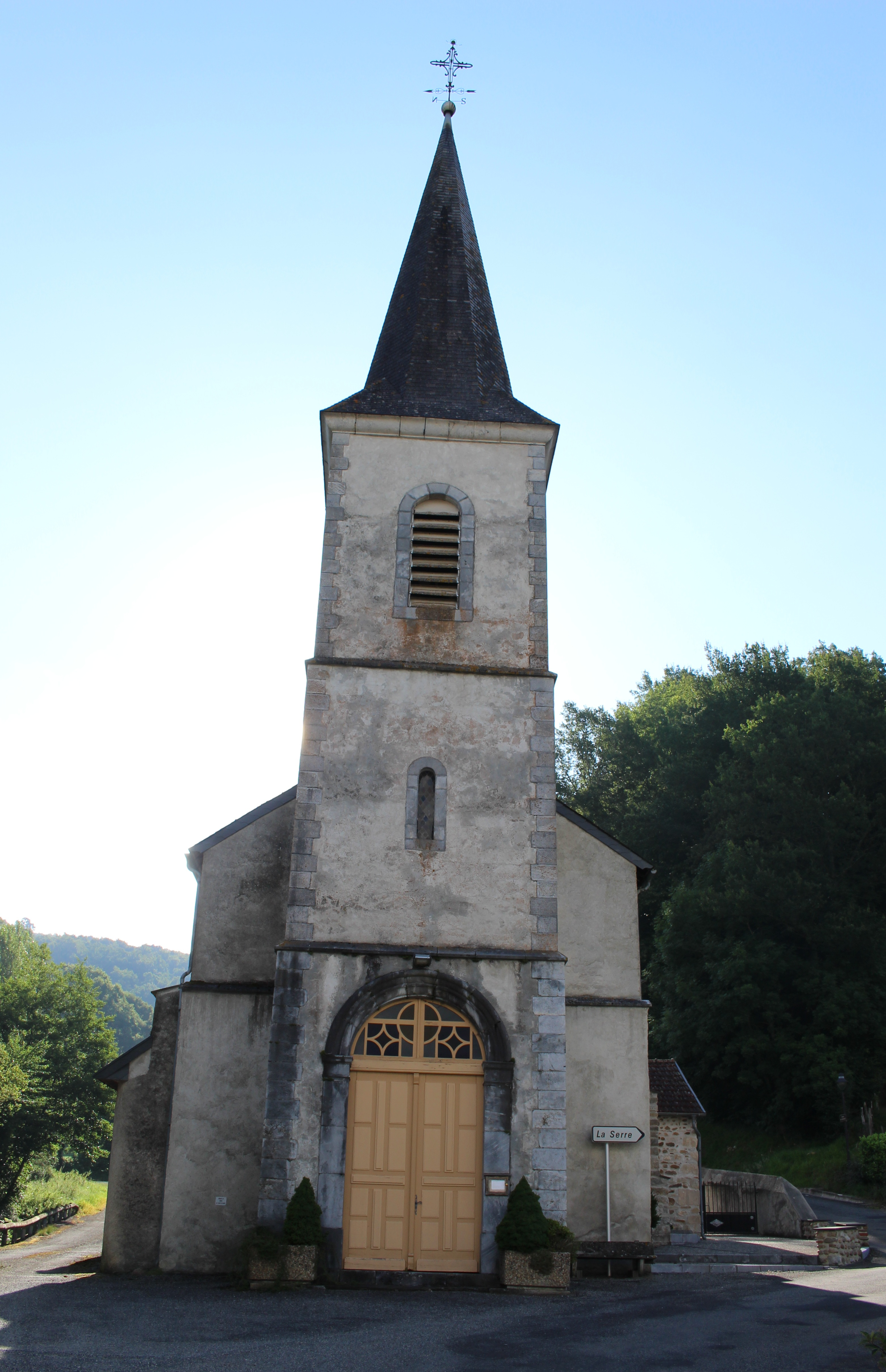 Église de l'Assomption de Ricaud (Hautes-Pyrénées)